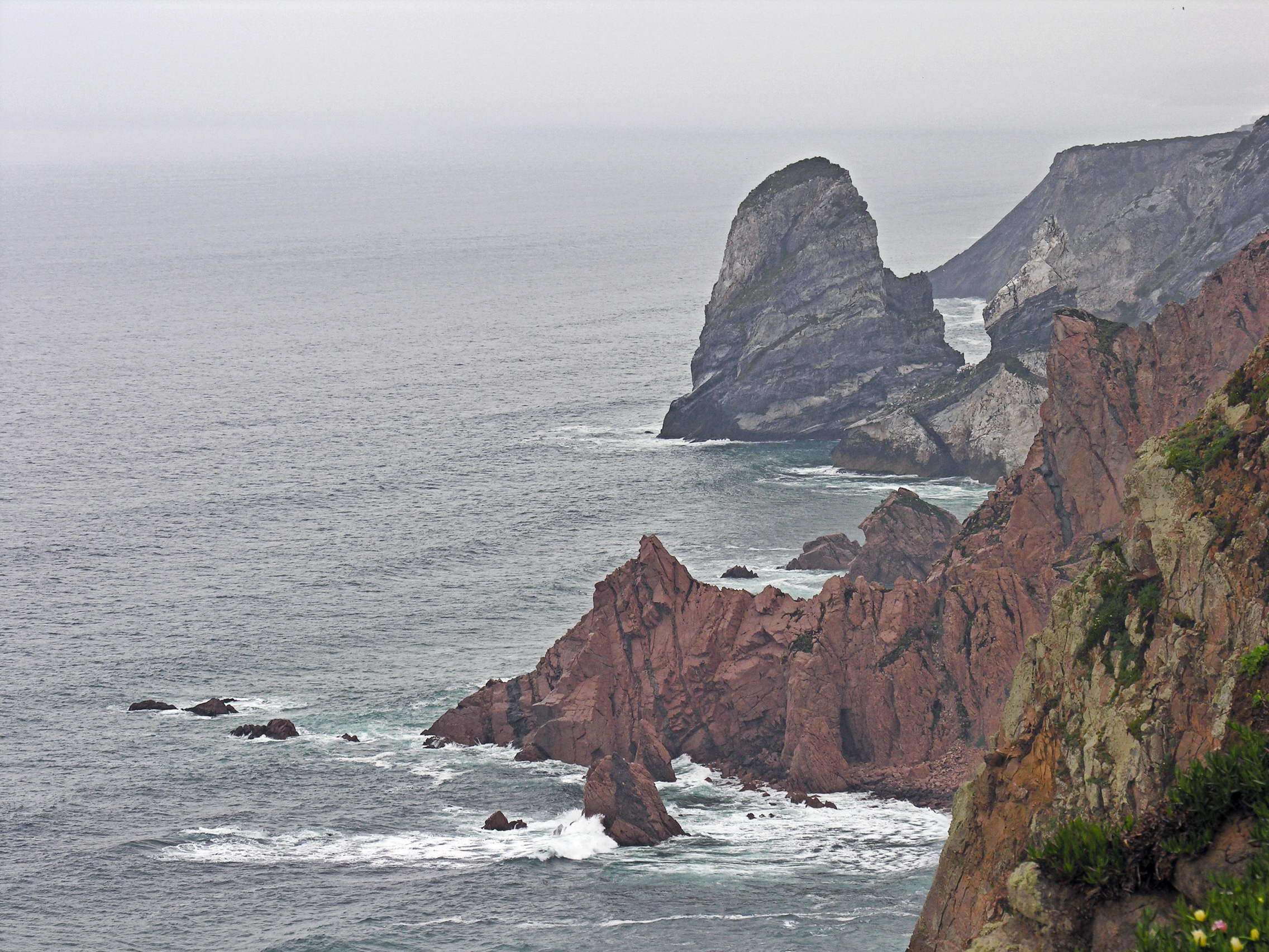 Cabo da Roca, Sintra, Portugal